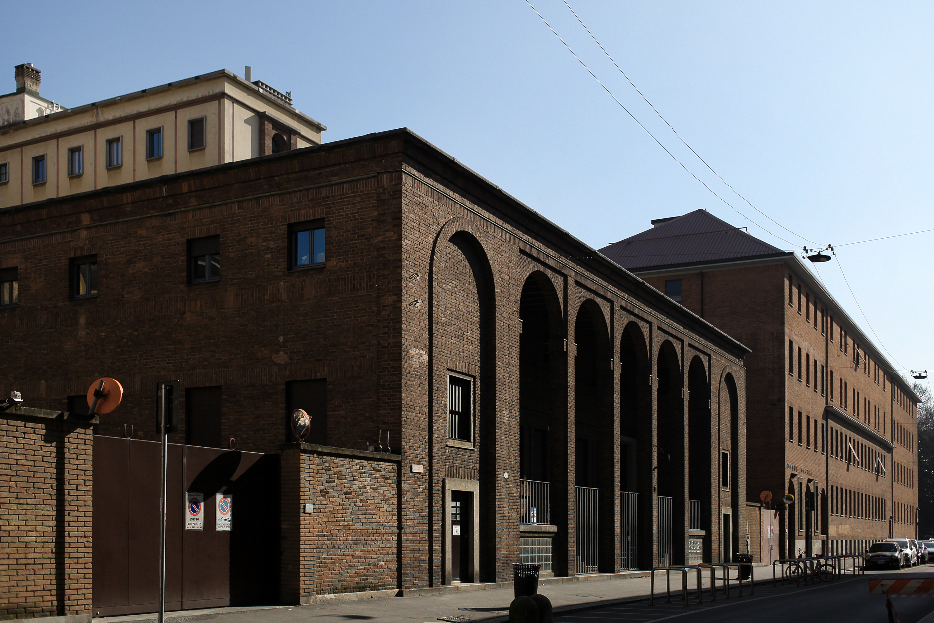 Università Cattolica di Milano, collegio Augustinianum, via Lodovico Necchi